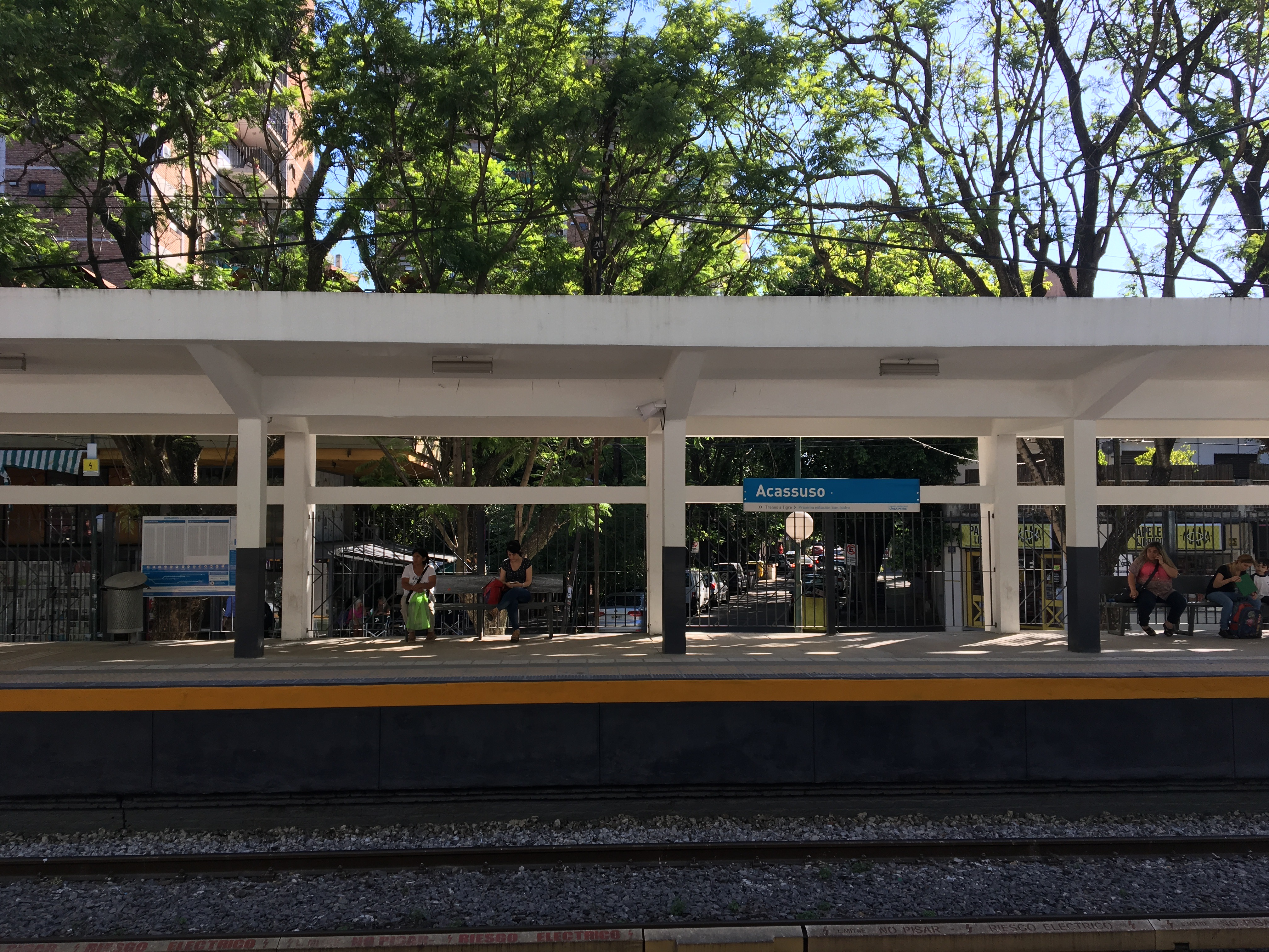 Anden con nueva señalética y cuadros de informacion, se puede ver el viejo refugio de hormigón renovado.